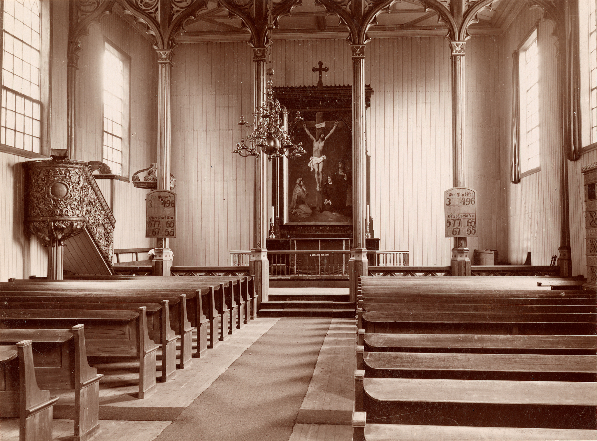 Holmen kirke. Foto: Christian Christensen Thomhav, fra Kulturminnebilder.no.